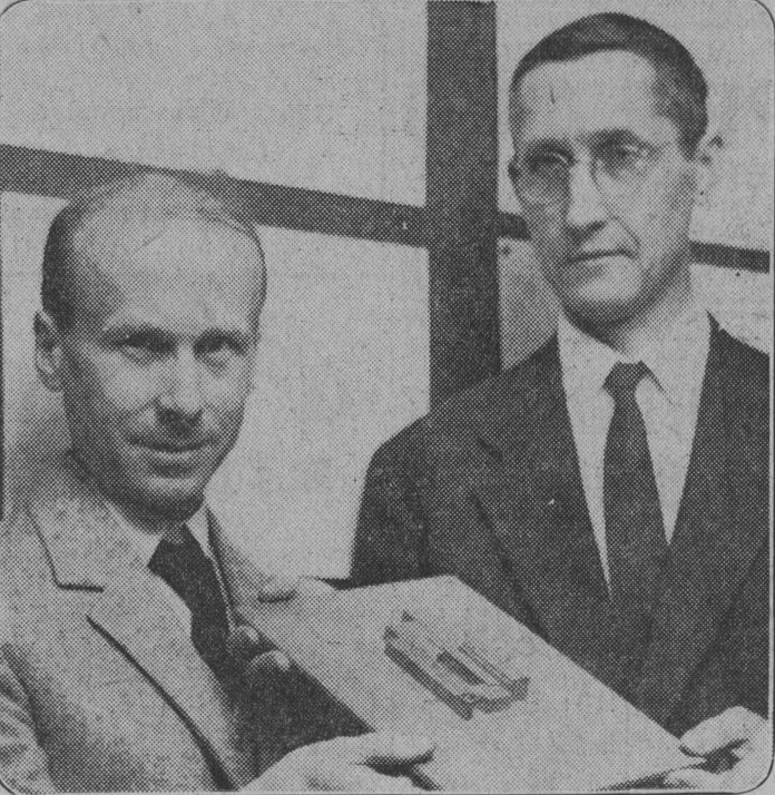 Arkitekterna Bertil Engstrand och Hans Speek med det segrande förslaget i idétävlingen till ny frikyrka i Enebymo, Norrköping